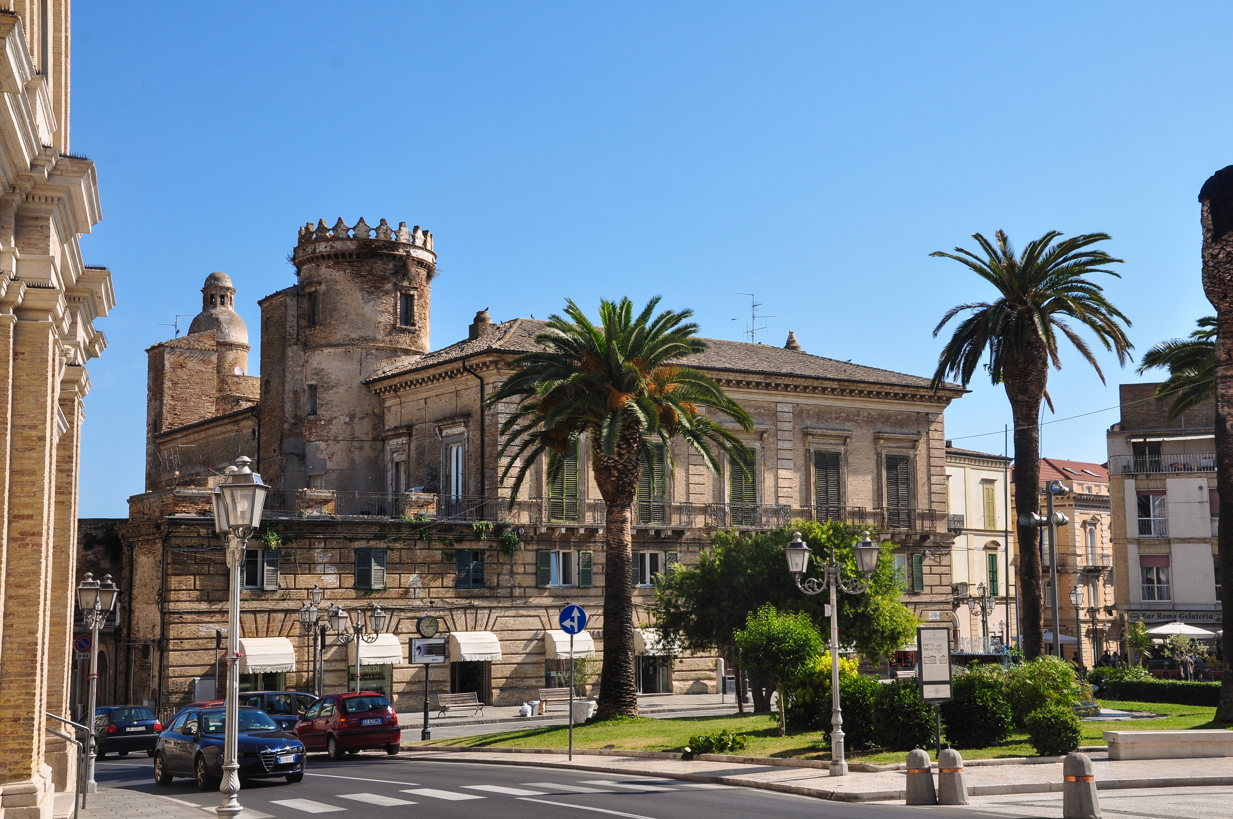 Piazza Rossetti, Vasto; Palazzo Palmieri arch.Nicola Maria Pietrocola